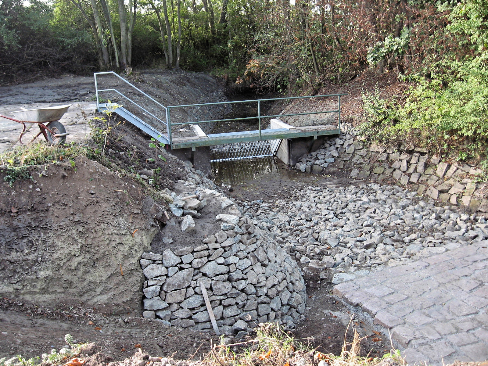 Leinakanal - Absetzbecken am Zufluss des Aquädukts